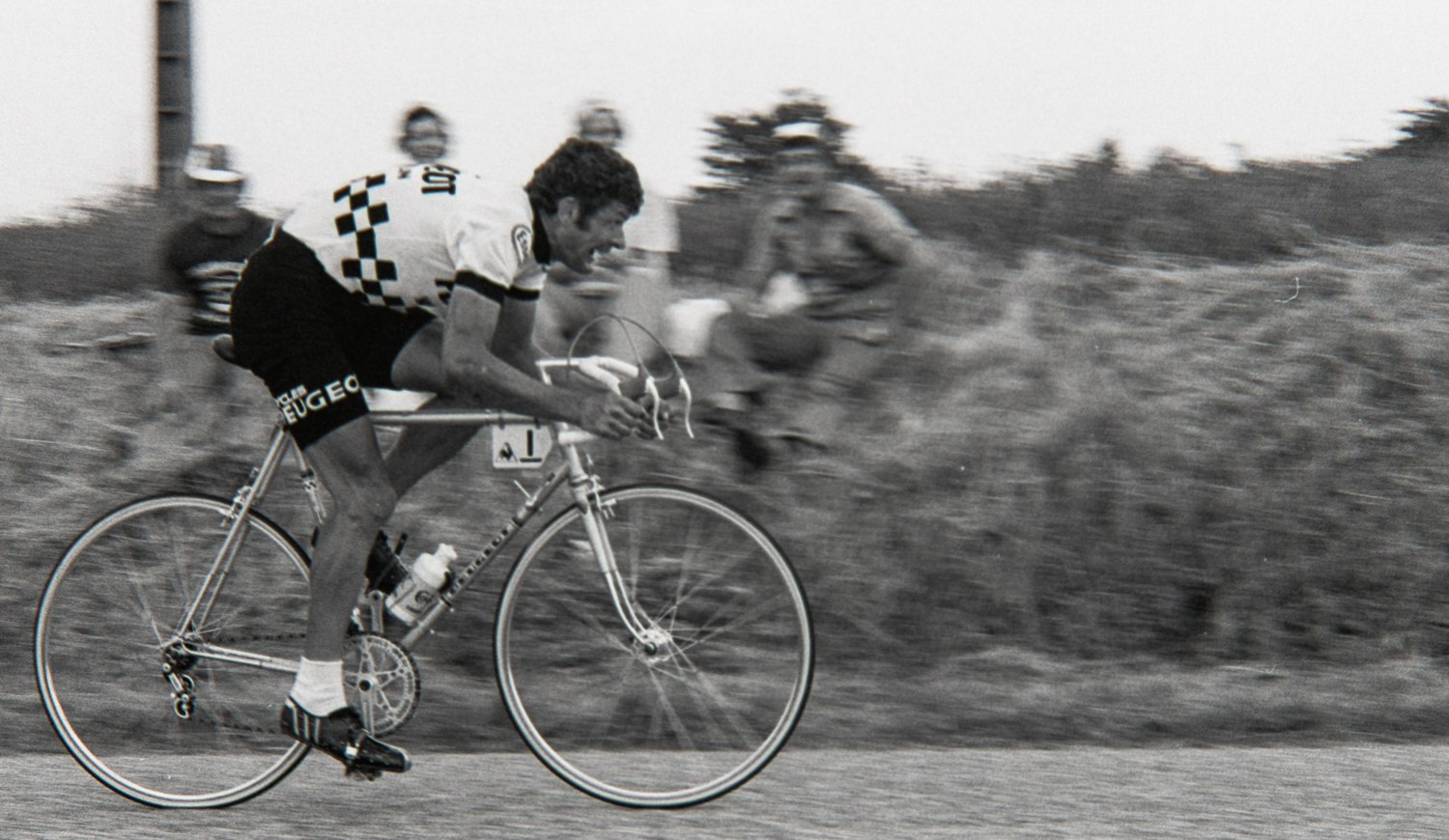 Bernard Thévenet durant le Tour de France 1976. Photographie : René Milanese